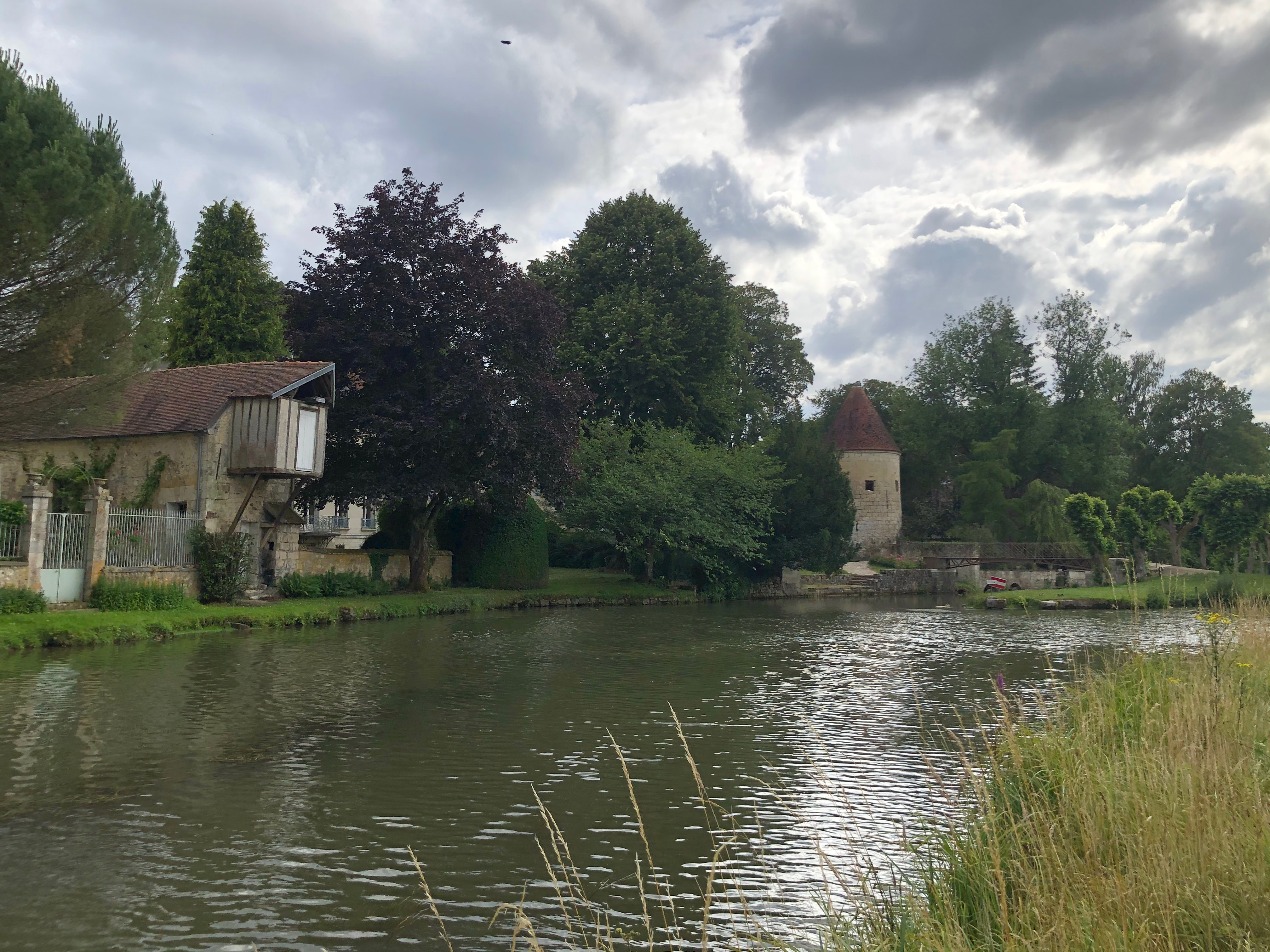 Rivière de l'Ourcq canalisée. A gauche, un ancien grenier à grain. Puis la passerelle Eiffel, une tour des fortifications et le Mail.